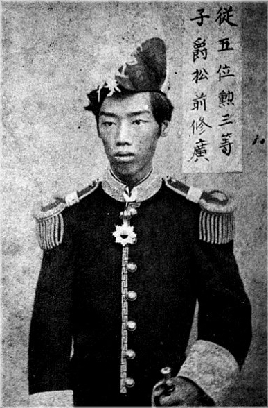 松前修広の肖像写真。